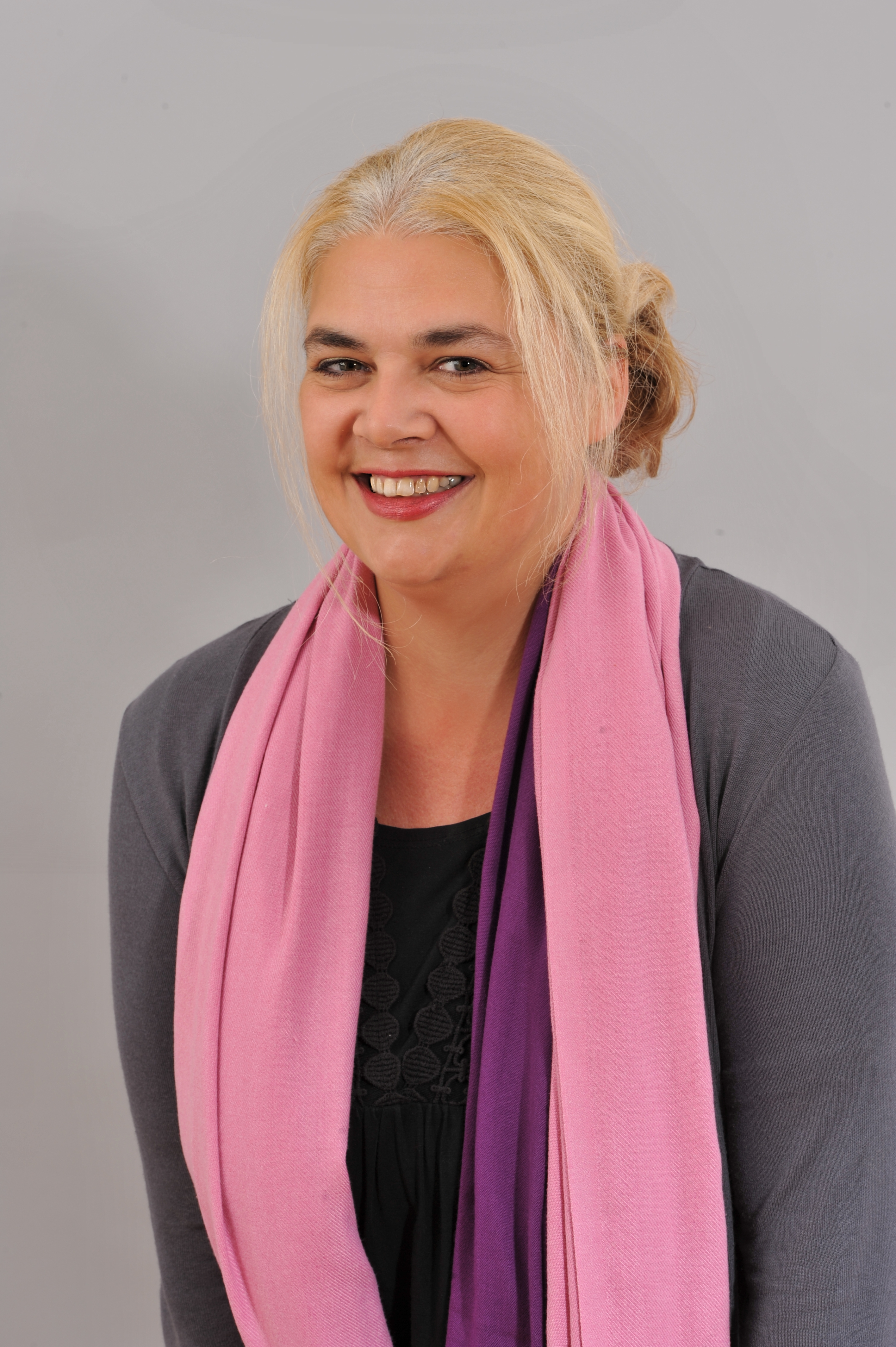 Landtagsprojekt Salzburg: Anja Hagenauer